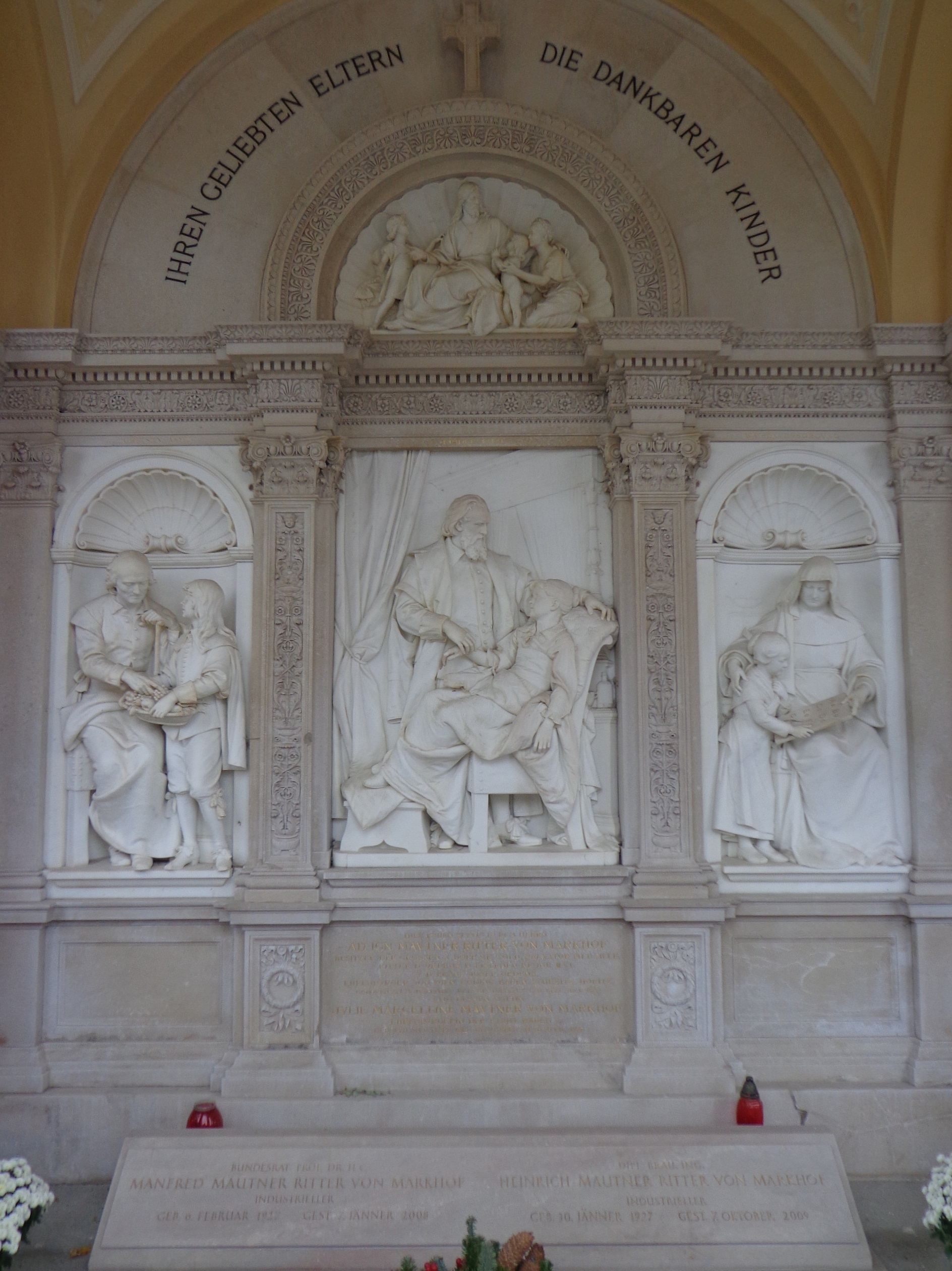 Wiener Zentralfriedhof, Alte Arkaden: Gruft 36: Gräber der Familie von Mautner Markhof. Vergleiche dazu Relief Krankenbesuch by Carl Kundmann, das dem Mittelrelief entspricht.